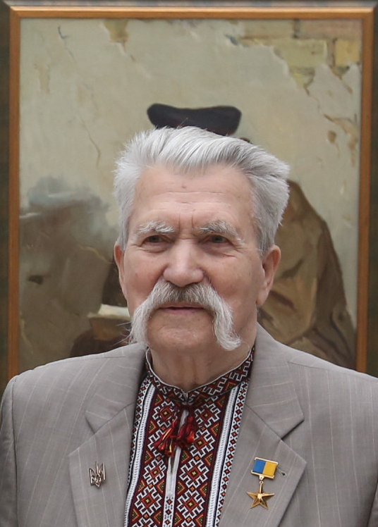 Левко Лук'яненко на церемонії вручення Національної премії України імені Тараса Шевченка 2016 року.